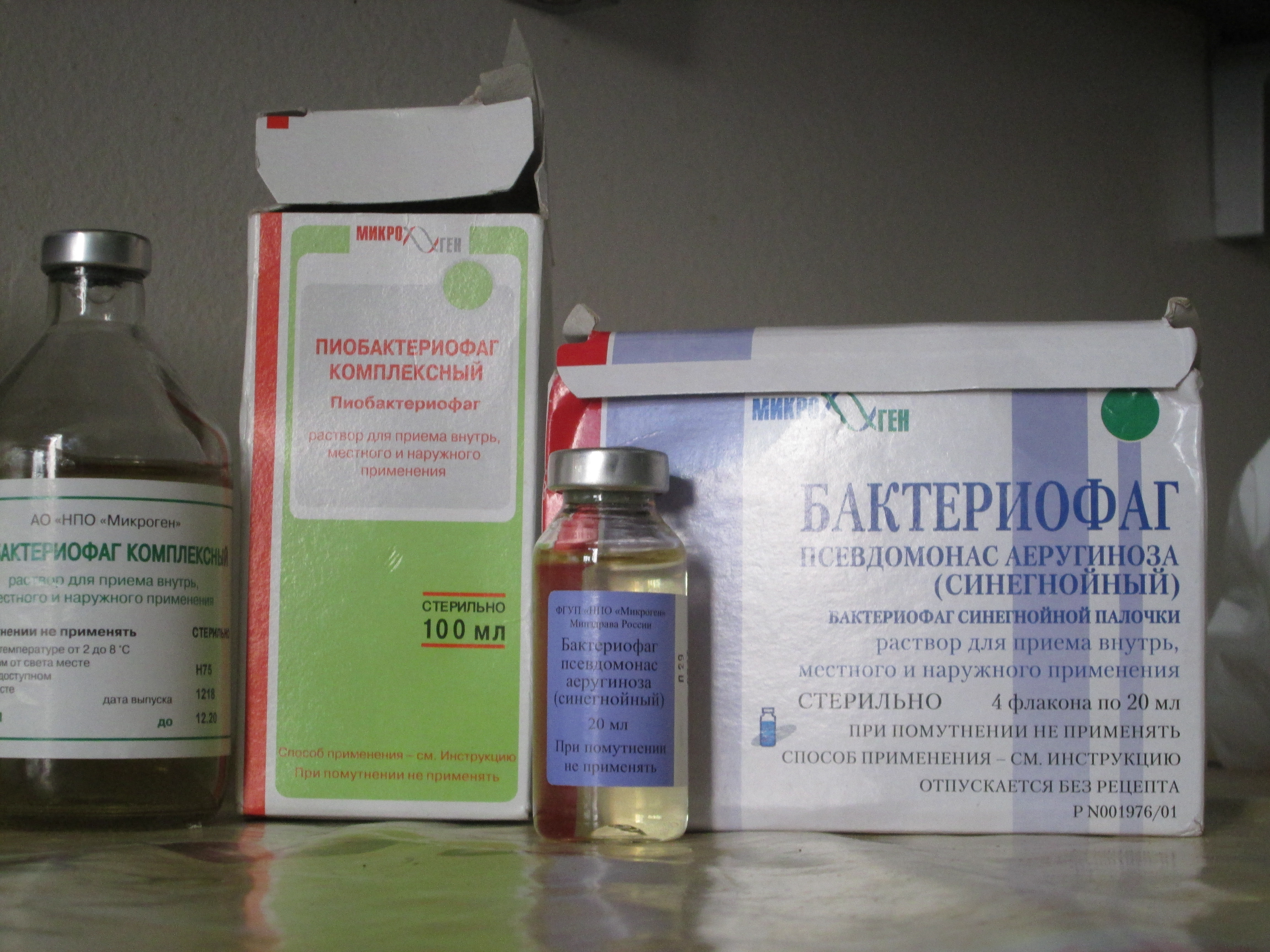 Cocktail multibactéries Pyo et cocktail spécifique Pseudomonas Aeruginosa